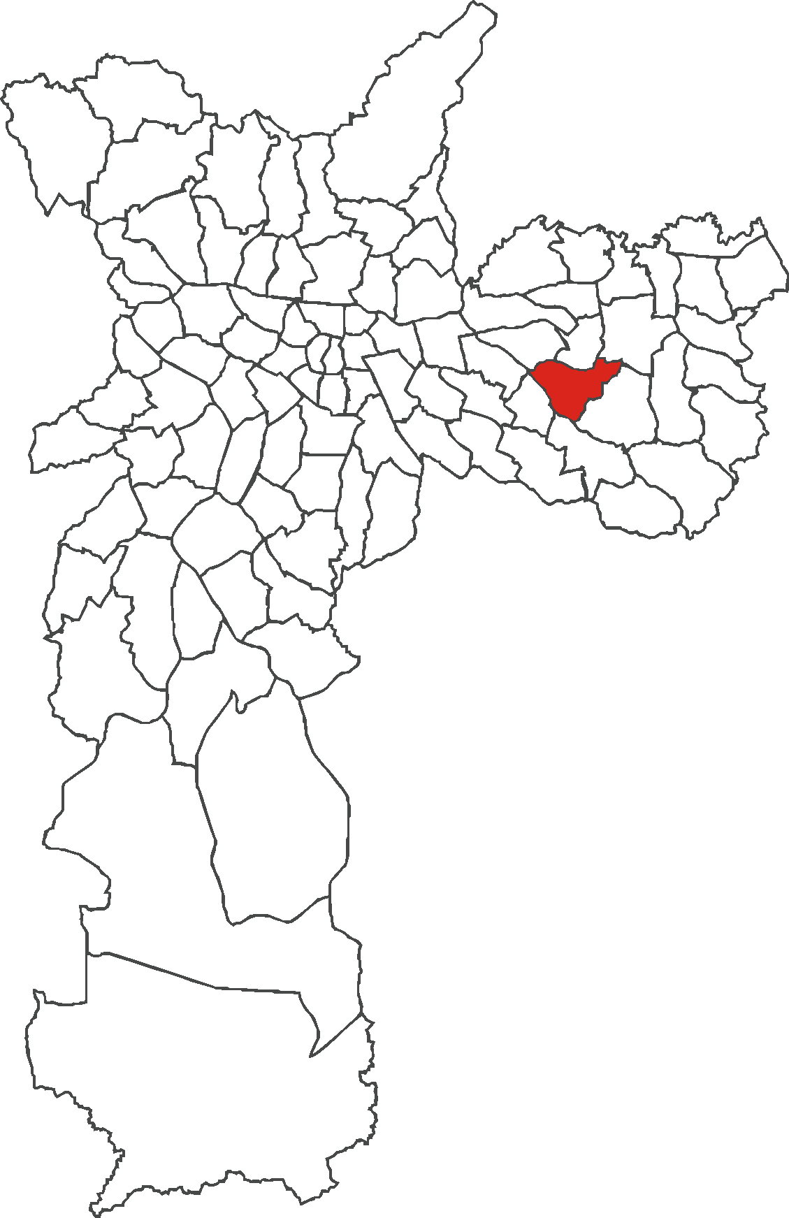 Localização do distrito de Cidade Líder no município de São Paulo.